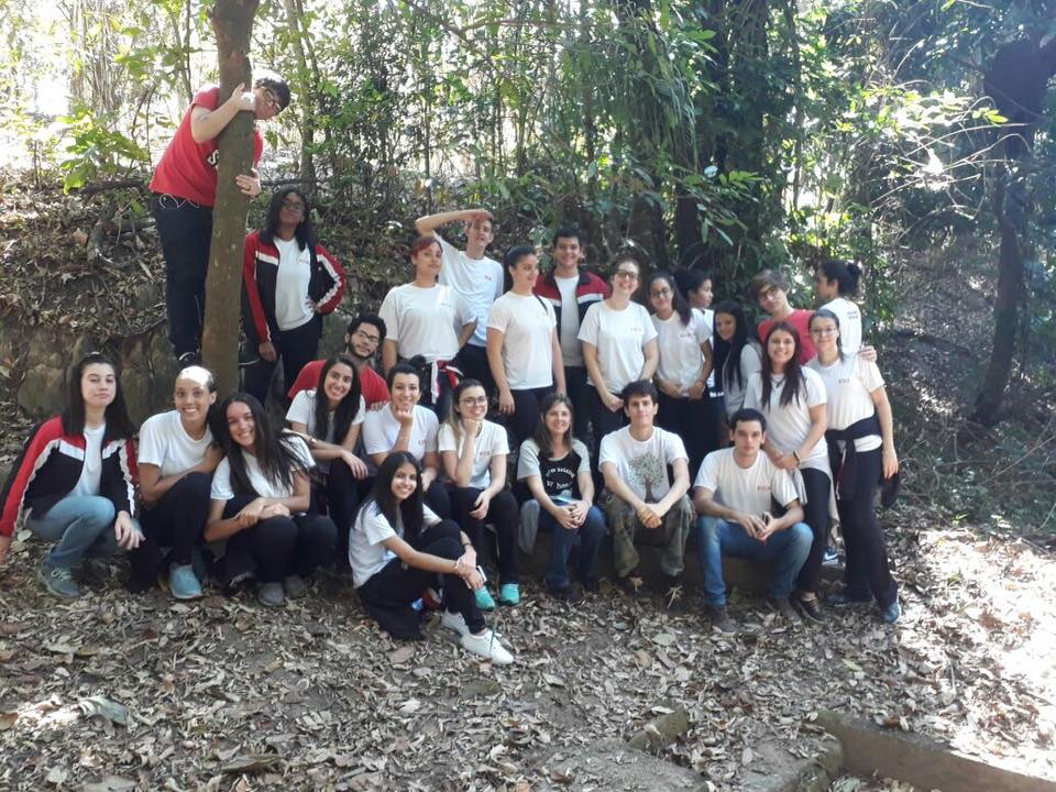 Turma de alunos da Escola SESI realizando uma visita ao Parque.